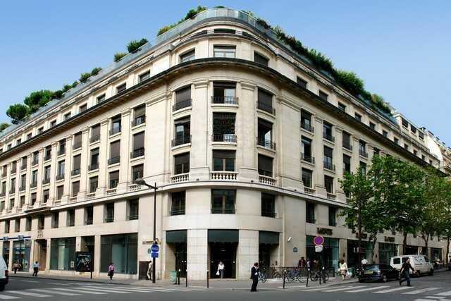 Photo du siège de Jones Lang LaSalle situé au 40-42 rue La Boétie à Paris 8ème.